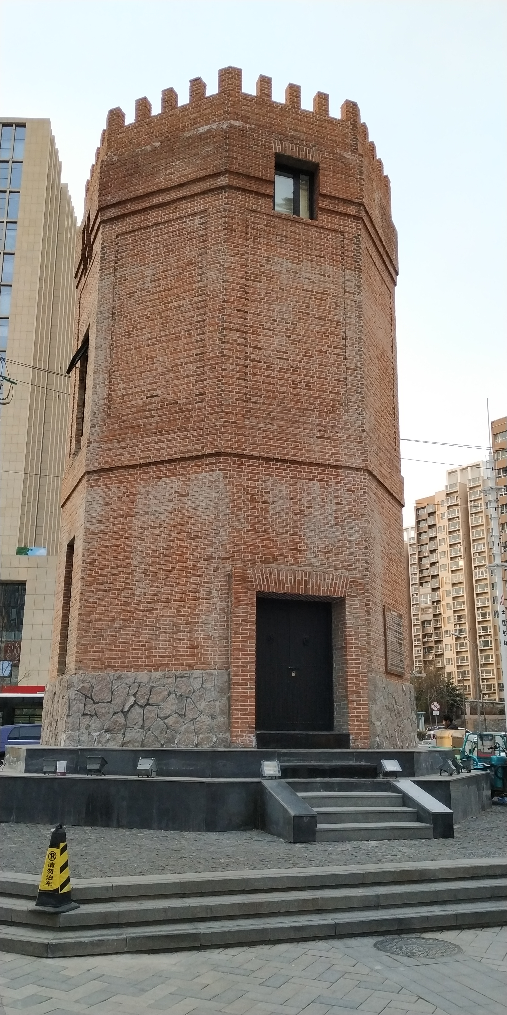 拆后重建的双山村水塔